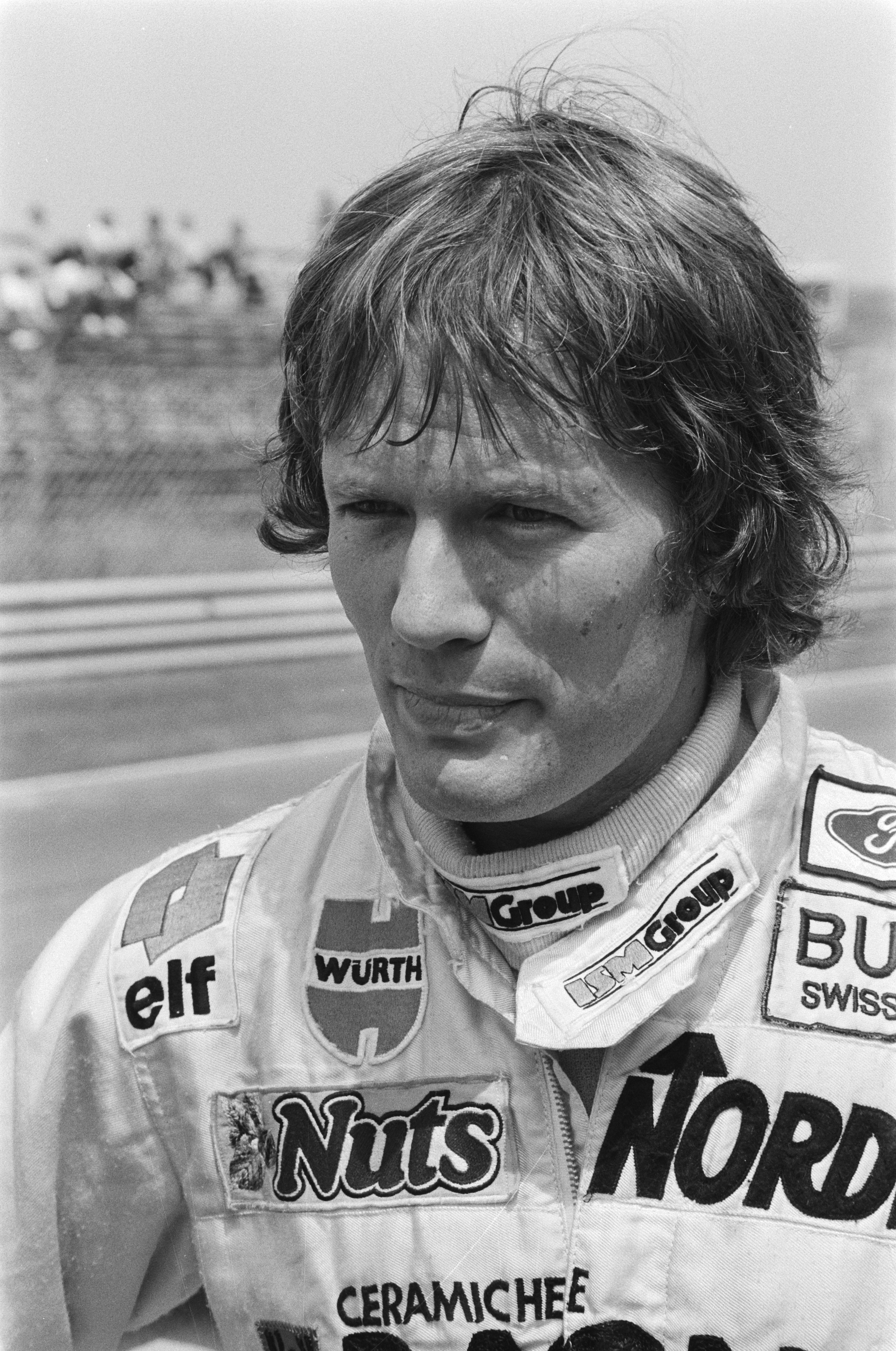 Marc Surer lors du Grand Prix des Pays-Bas 1982 à Zandvoort.